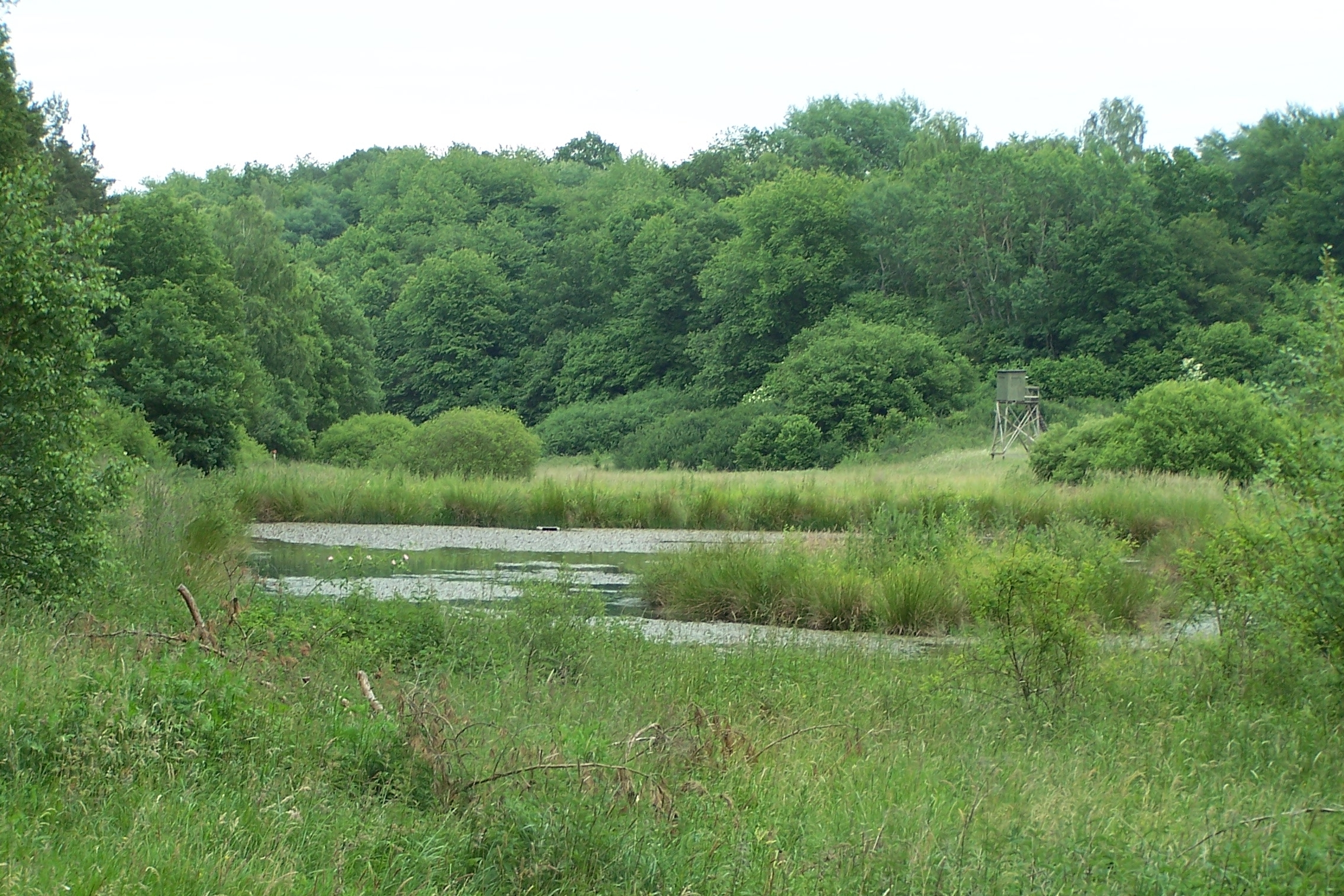 Verlandete Teiche im Höllgrund südwestlich der Ortslage.